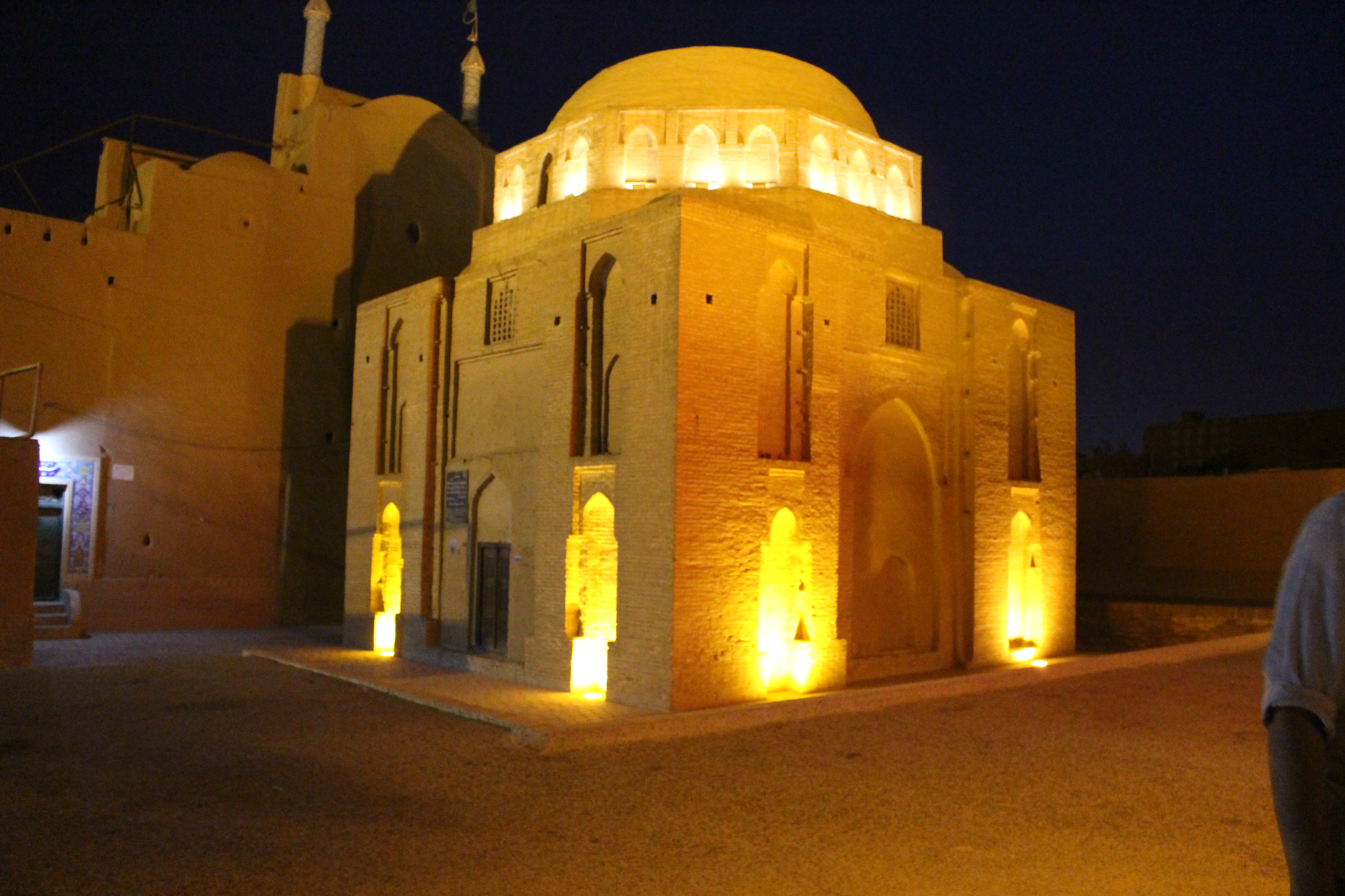 بقعه دوازده امام